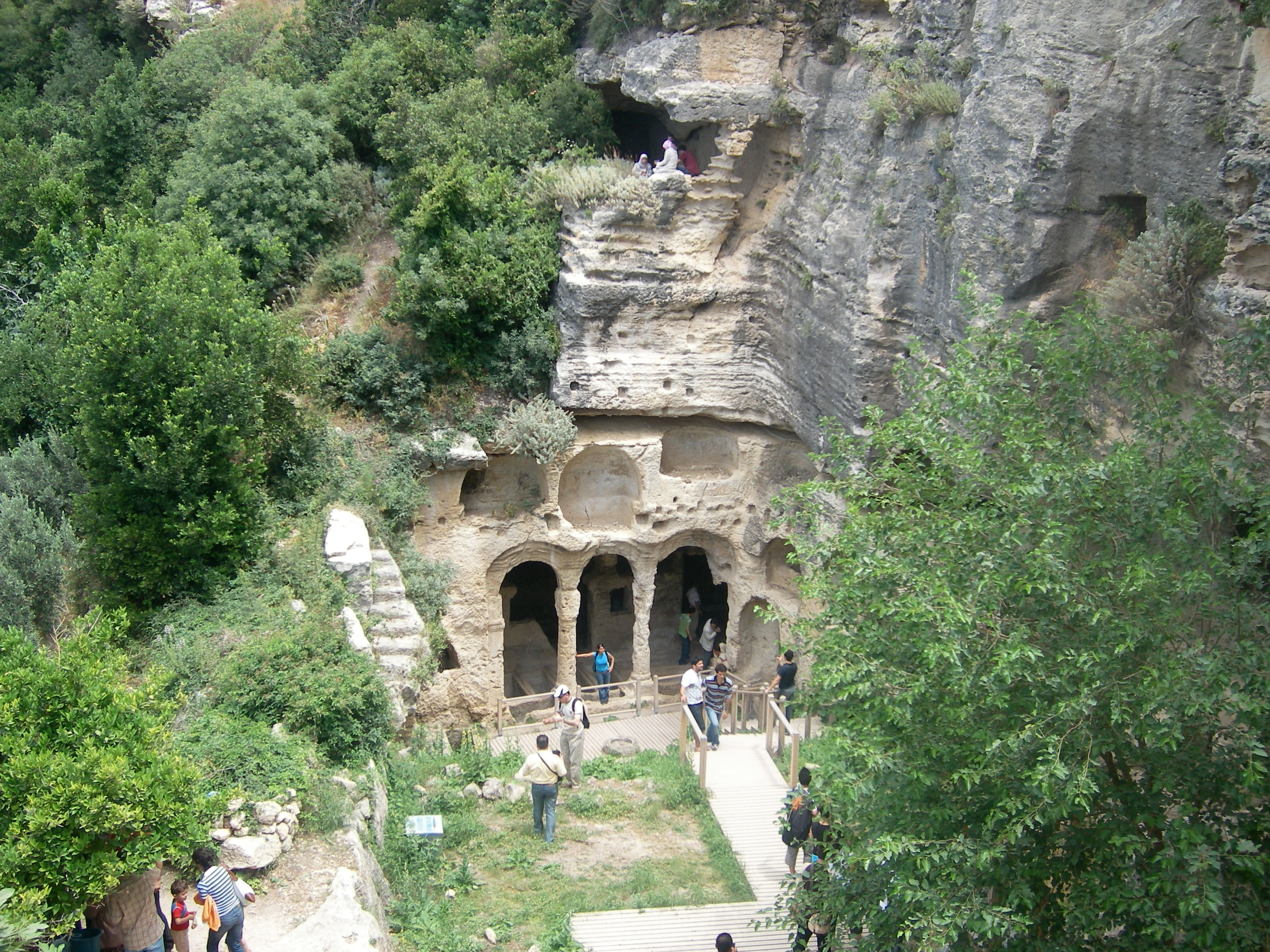 Samandağ'da Beşikli Mağara